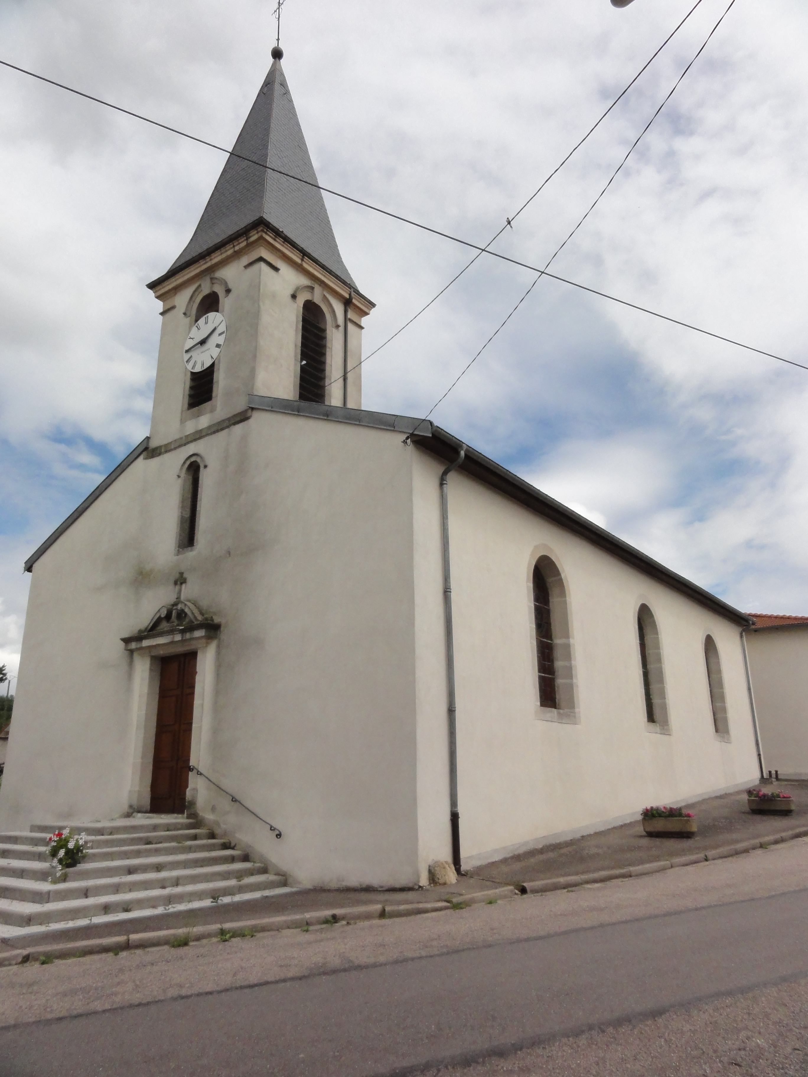 Mazerulles (M-et-M) église